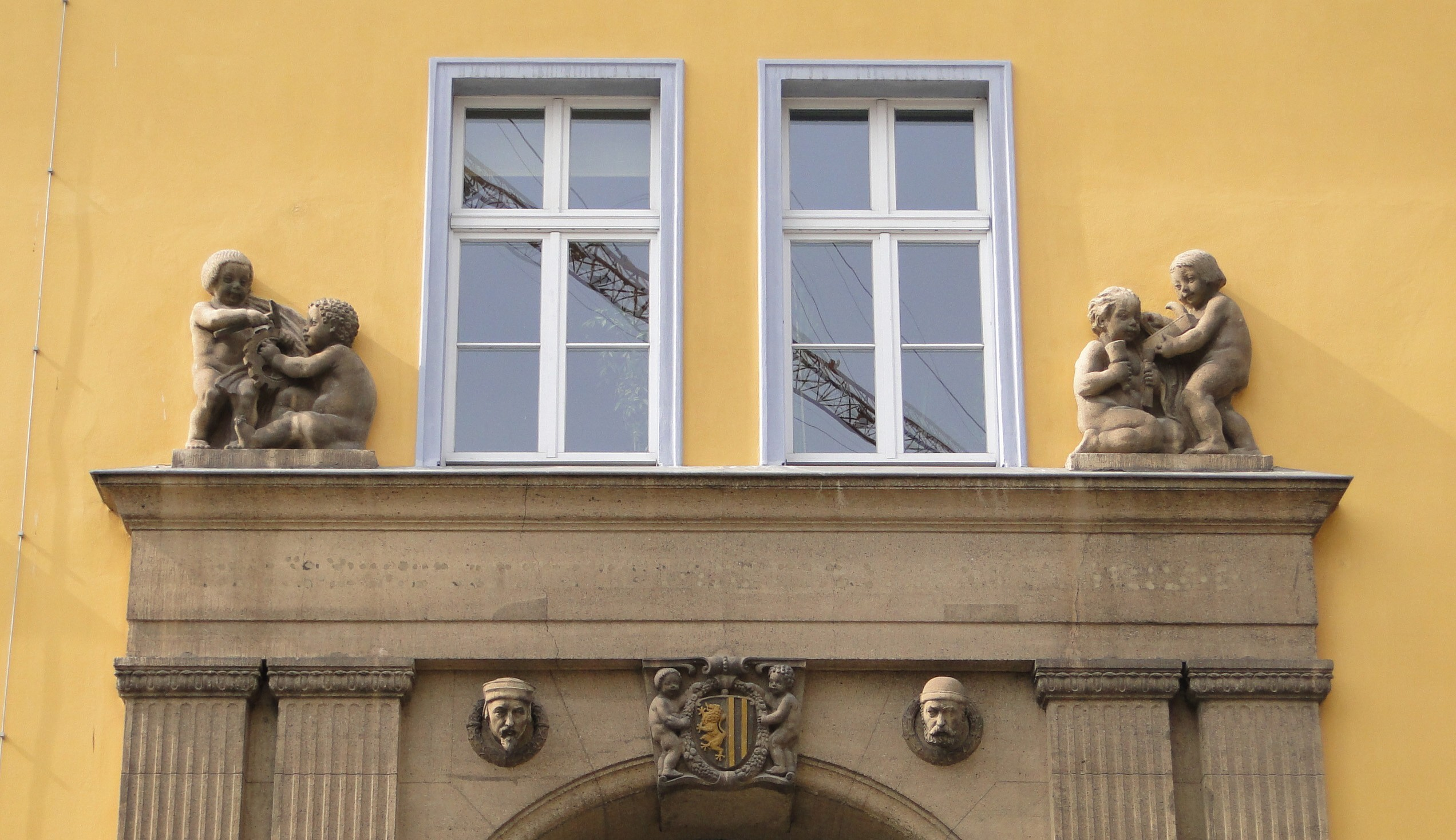 Schulportal in Dresden-Neustadt, figürliche Gestaltung von Otto Pilz